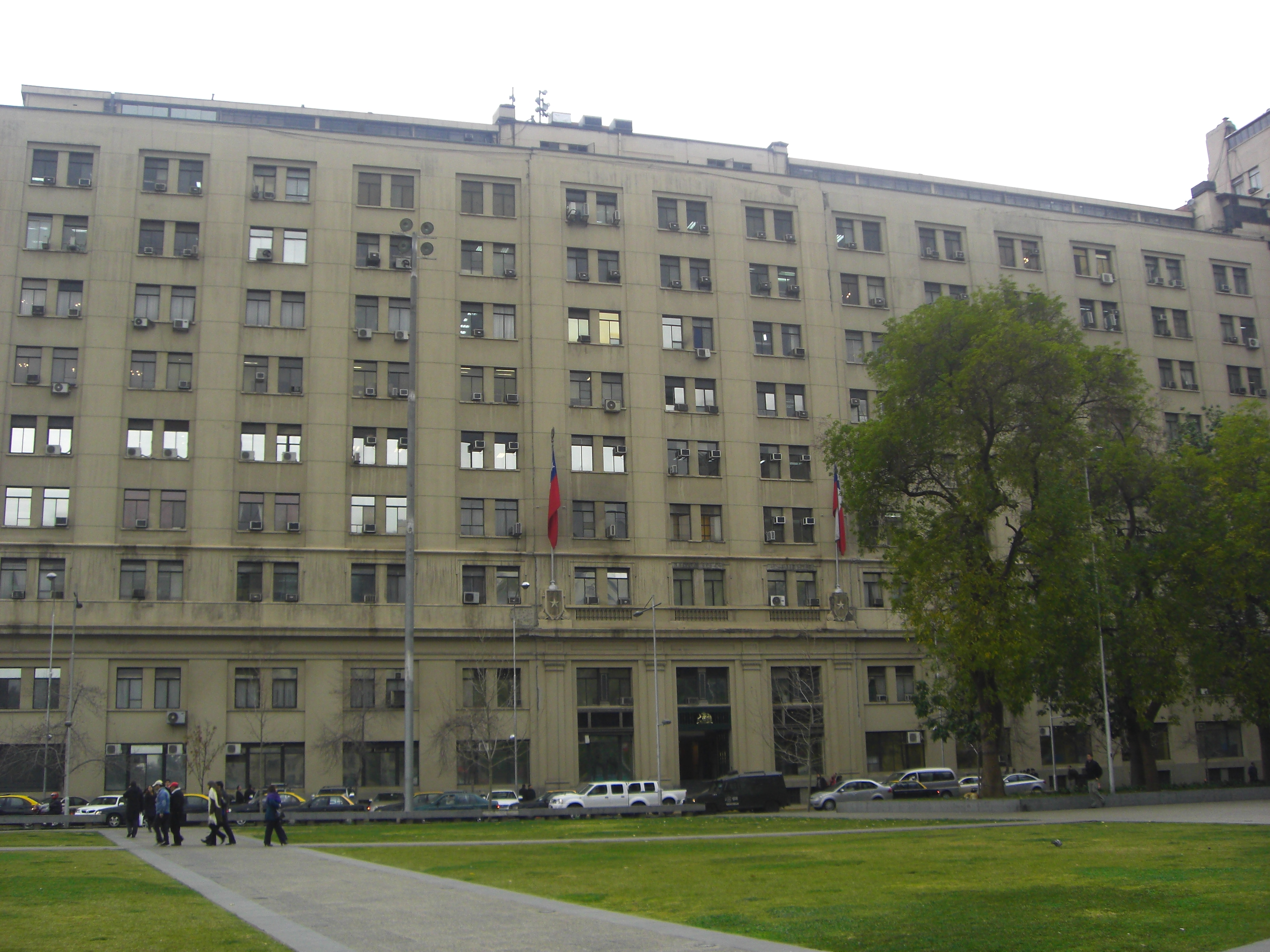 Fachada por calle Zenteno del histórico edificio del Ministerio de Defensa Nacional de Chile, utilizado luego como Edificio de las Fuerzas Armadas devuelto al Ministerio el año 2009.